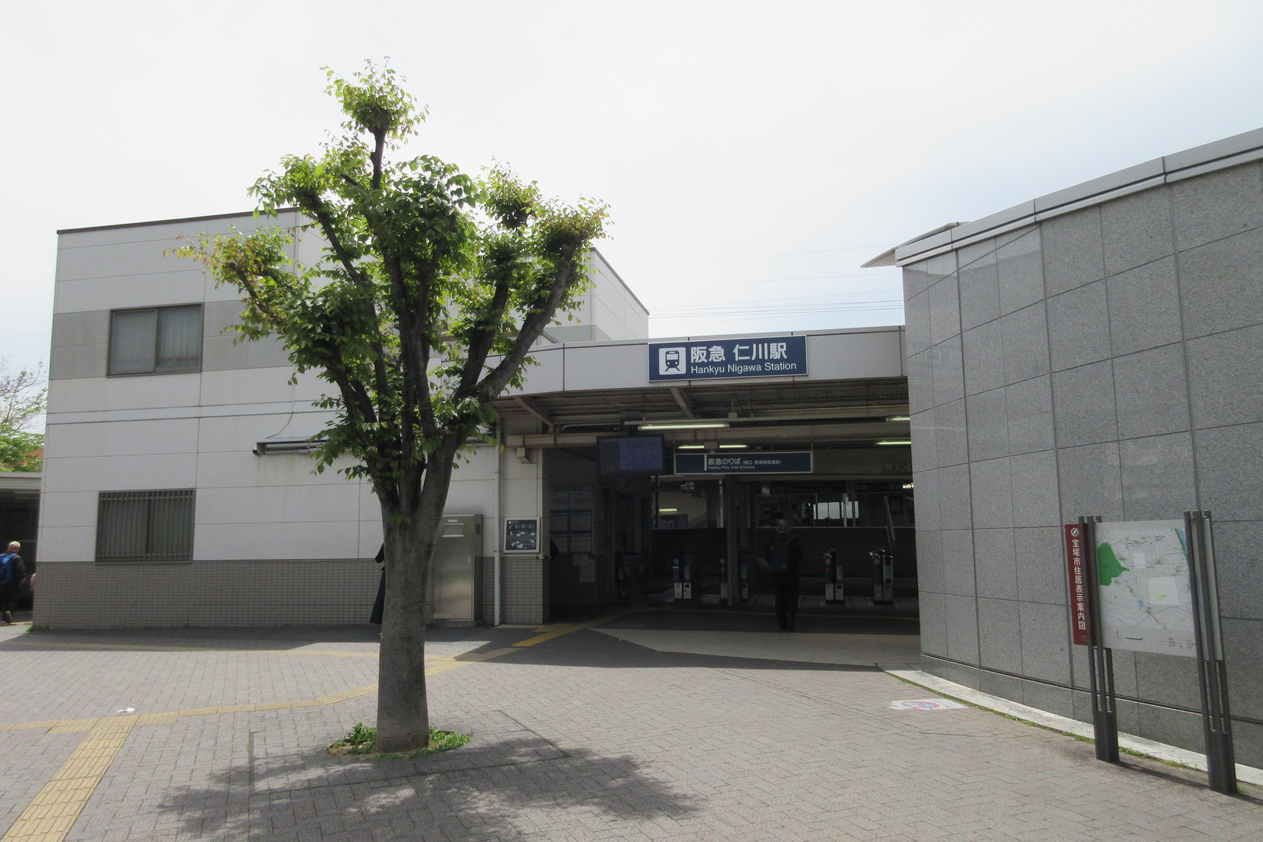 阪急電鉄仁川駅